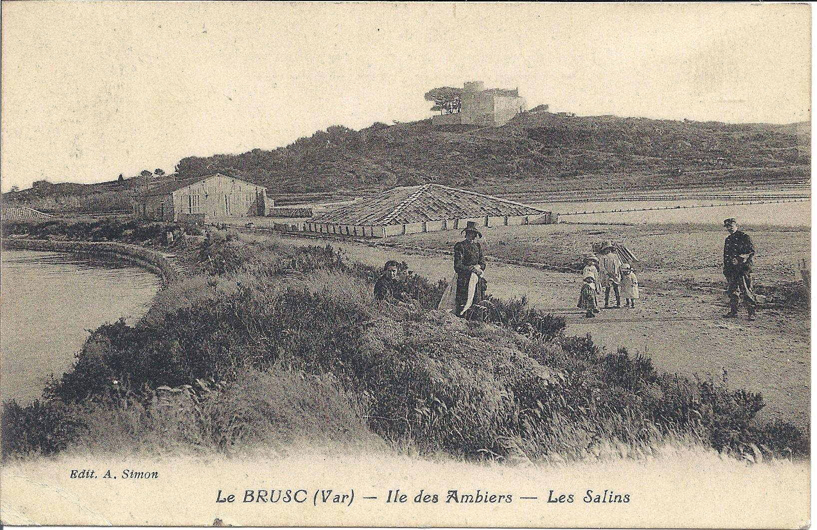 Carte postale d'avant 1900 représentant les marais salants de l'île des Embiez, orthographié à l'époque "Ambiers". A doite un douanier, au centre un tas de sel ou Camelle et en arrière plan le château.